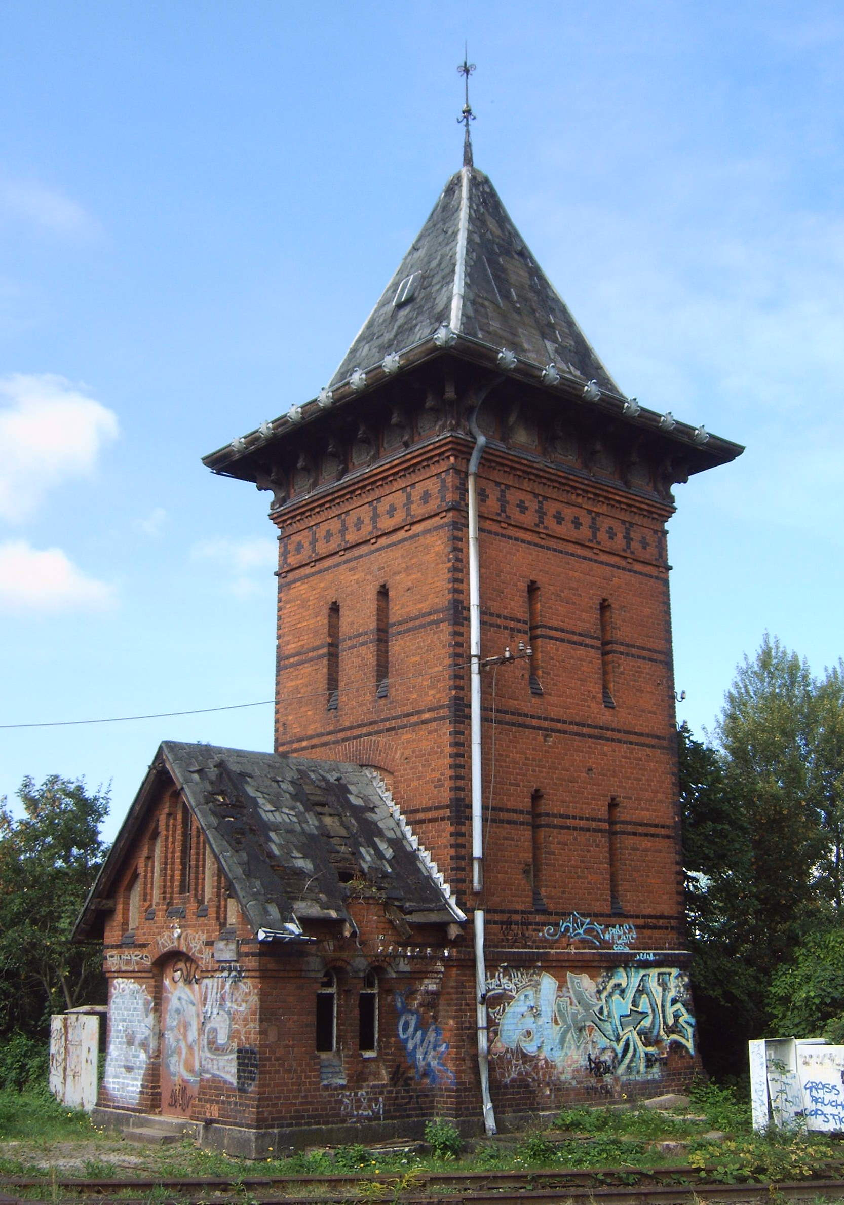 Wasserturm an der Hubbrücke Magdeburg, Schleinufer